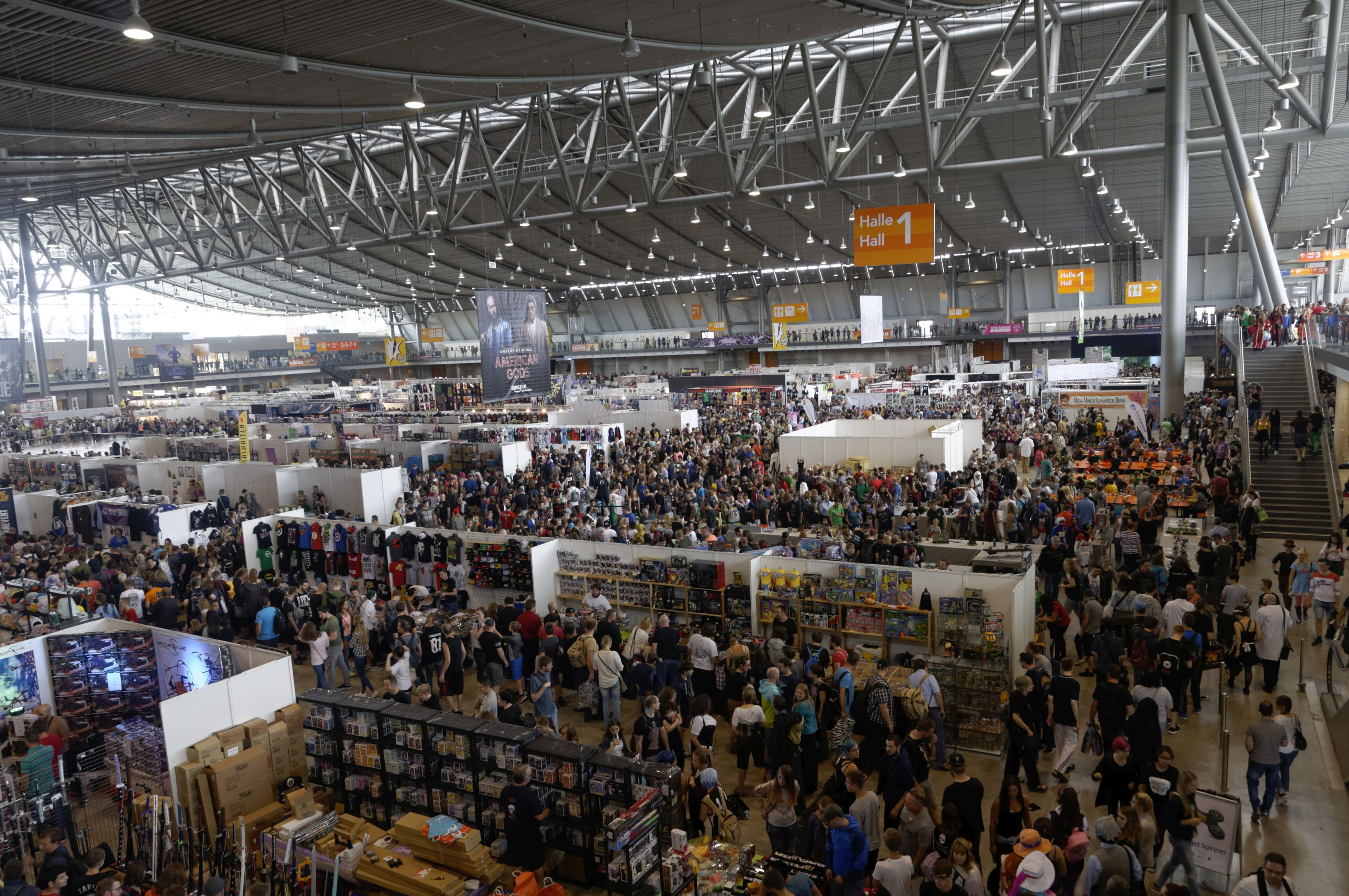 Bilder von der Comic Con Germany in Stuttgart 2017